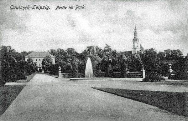 Der Park in Gautzsch (Kees'scher Park) um 1900